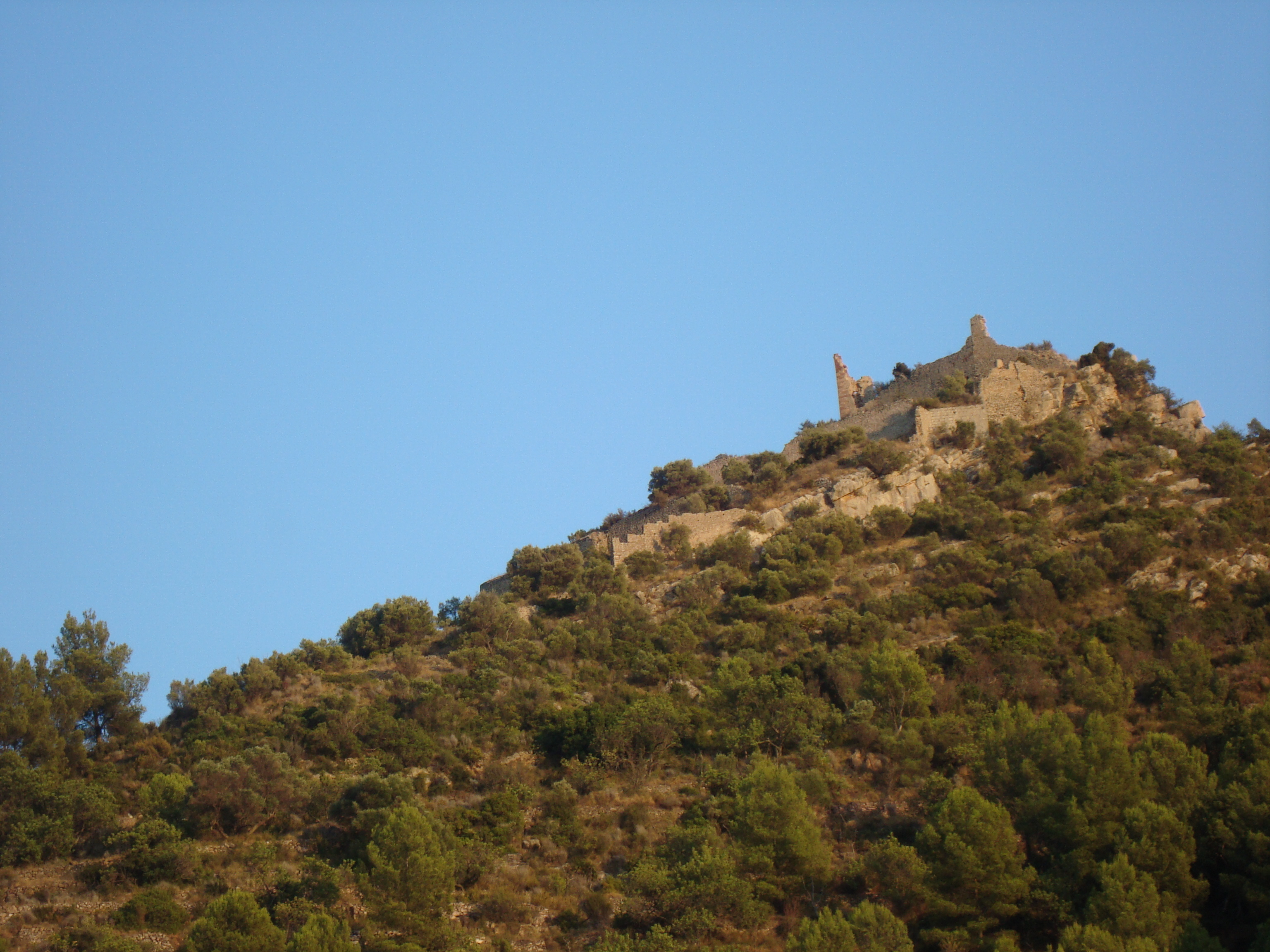 Castillo de Miravet, Cabanes, Castellón